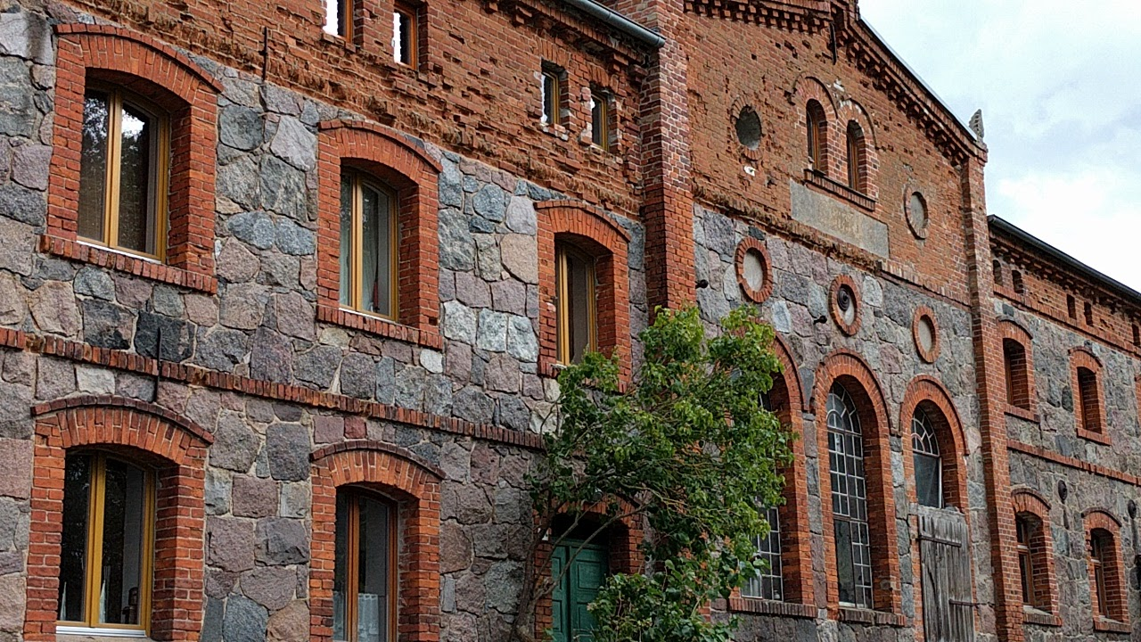 Brennerei, umgebaut zum Wohnhaus.